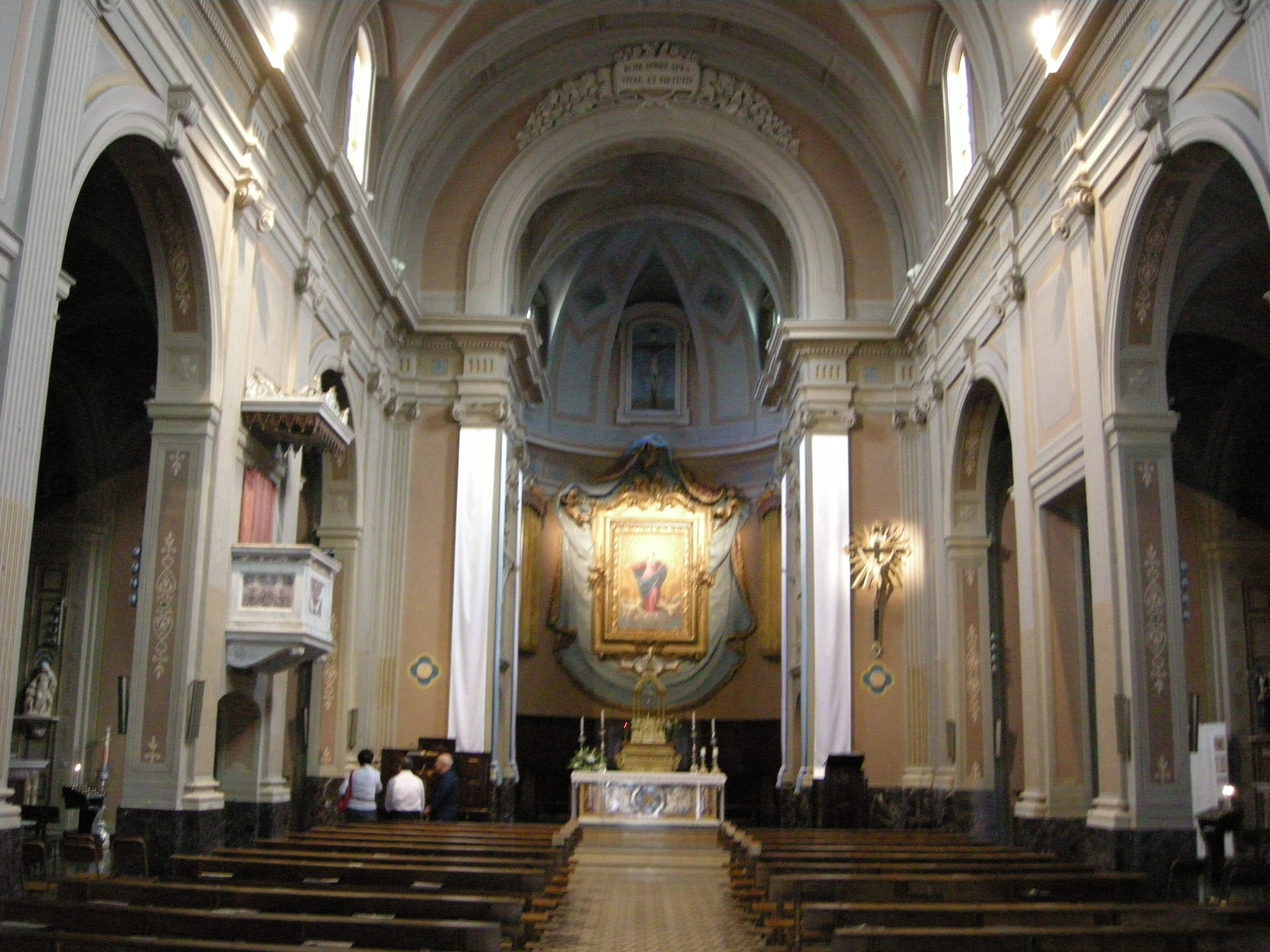 Santa Maria Assunta (Castelfranco Emilia)